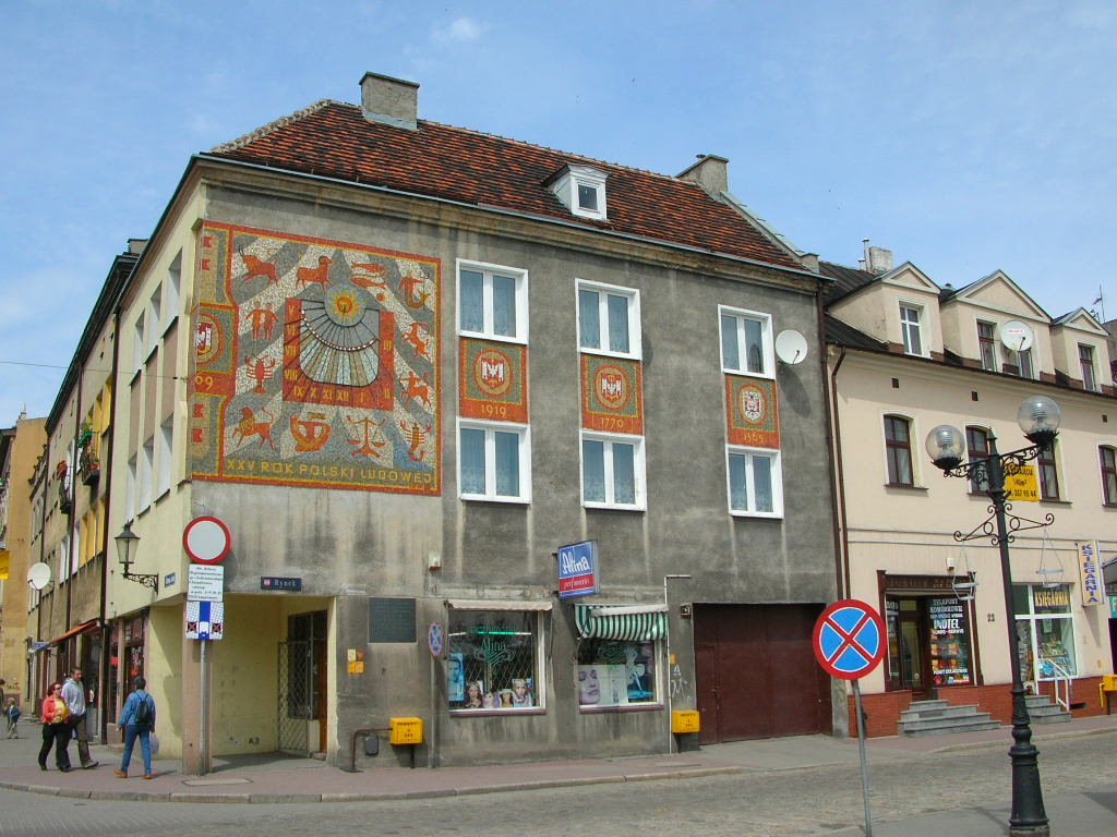 Kamienica w rogu rynku z zegarem.